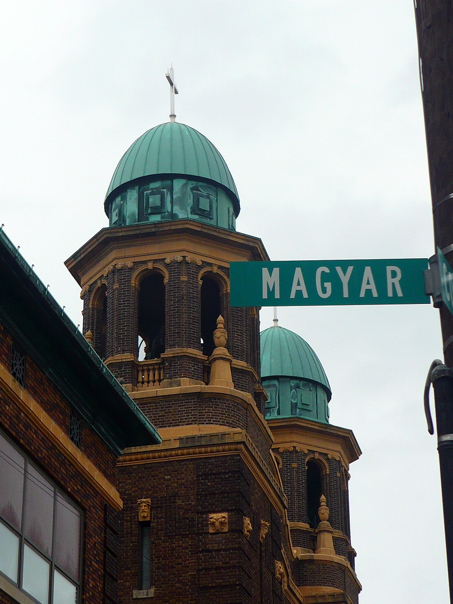 St. Stephen Hungarian Church in Birmingham, Toledo, Ohio